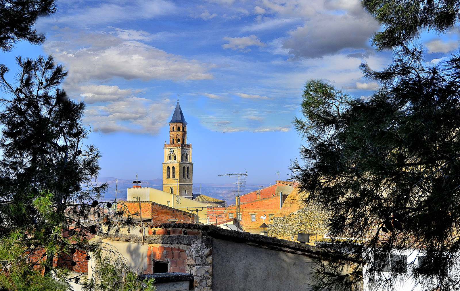 Iglesia parroquial de San Pedro de Fraga (Huesca)